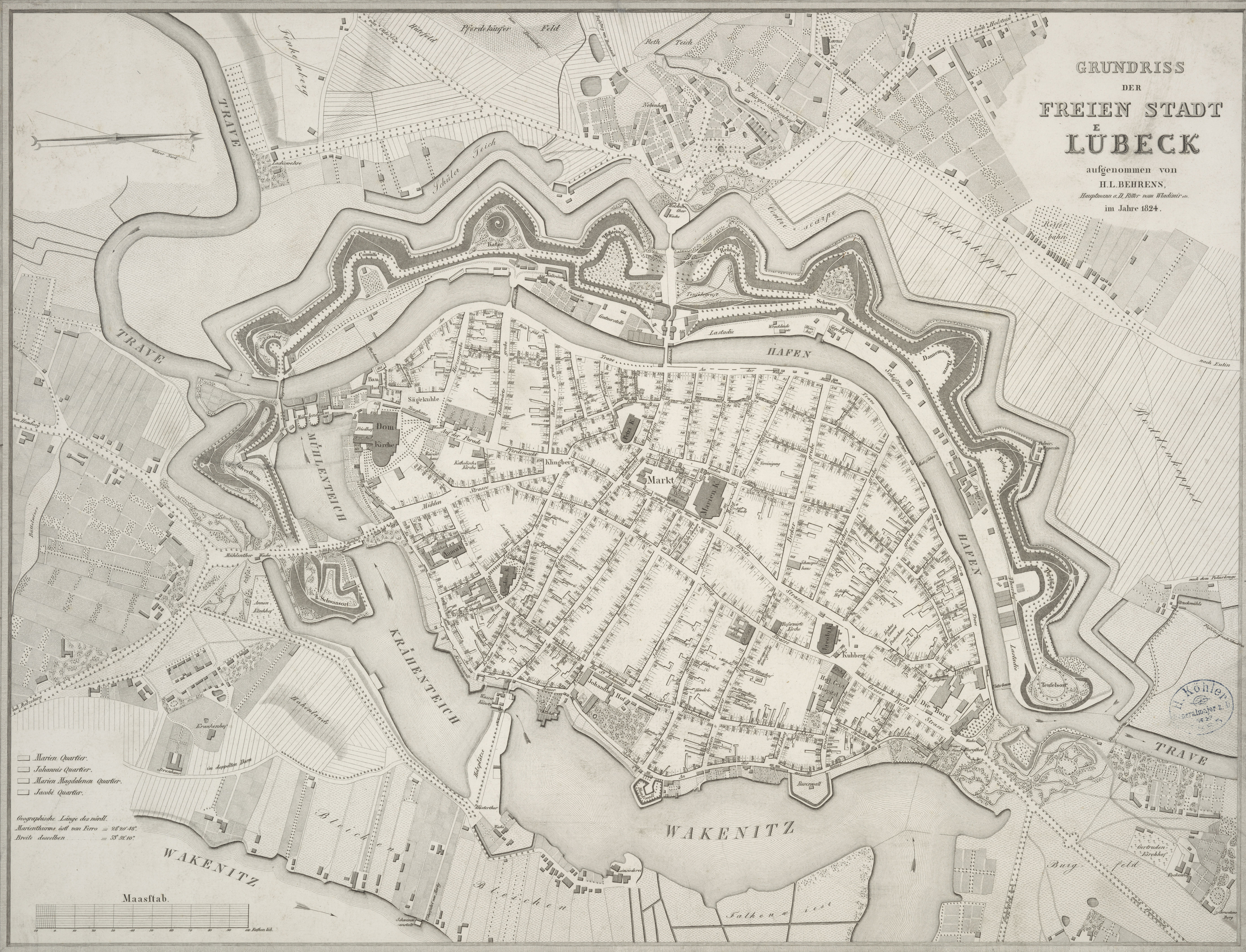 Stadtplan von Lübeck, 1824